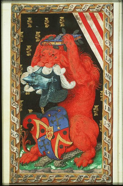 Livre d'heures KB, 74 G 38 - fol. 1v